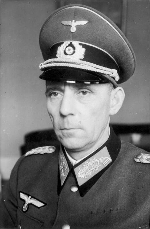 Generalmajor Adolf von Schell. Generalbevollmächtigter für das Karftfahrwesen. 8.3.40 PK-Sch.